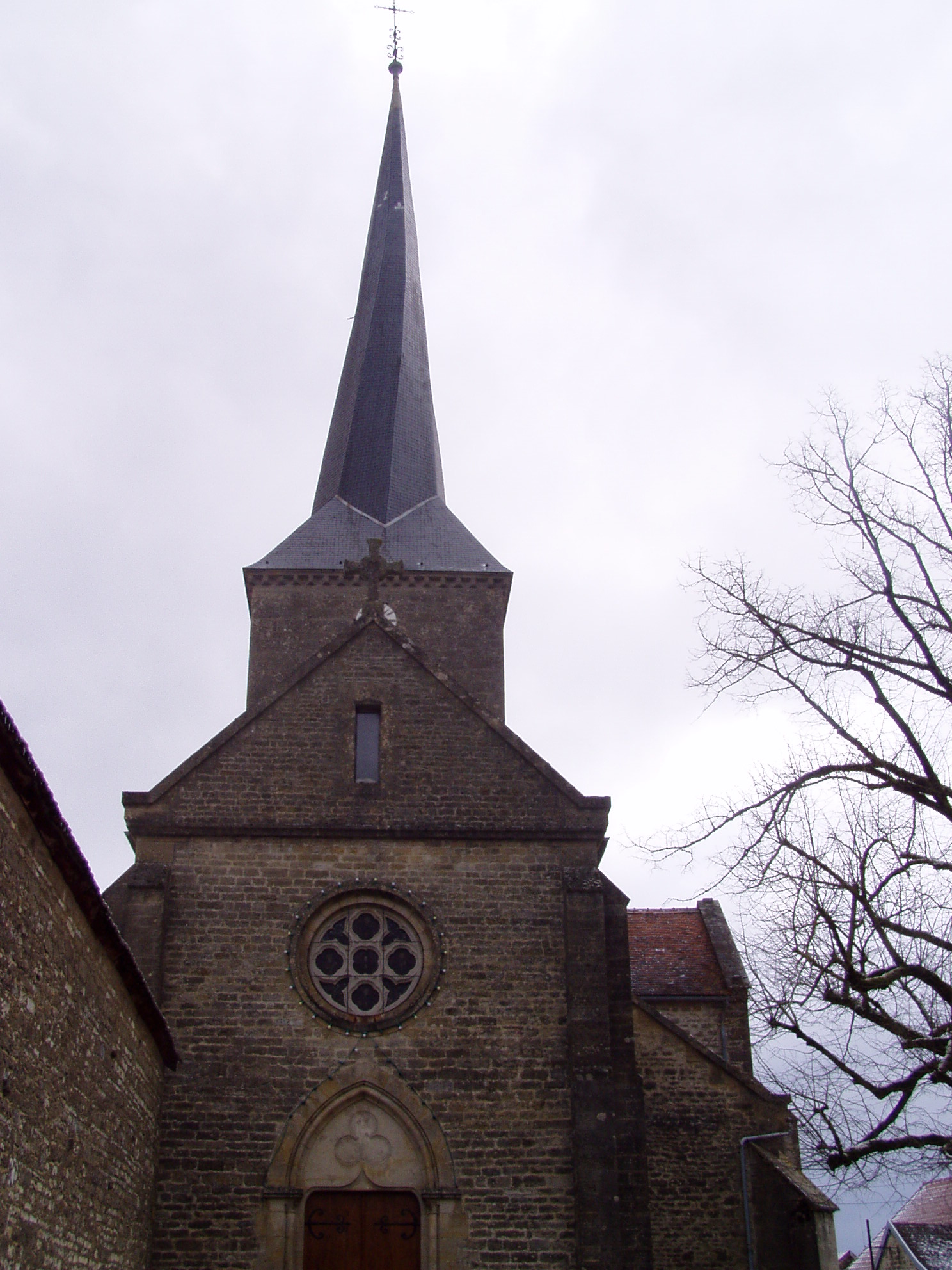 photo du clocher tors de Gigny dans l'Yonne (France)